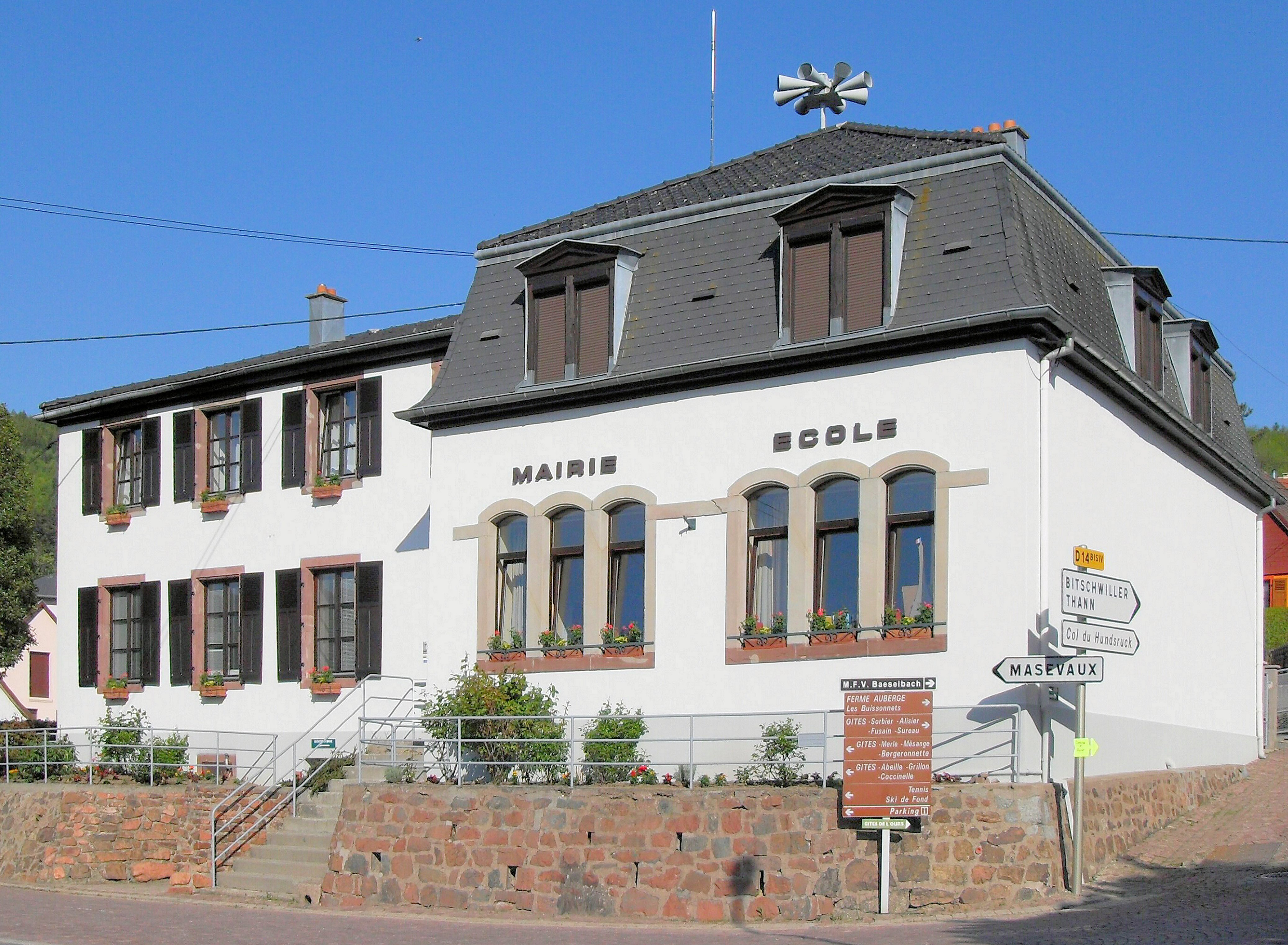 La mairie-école de Bourbach-le-Haut